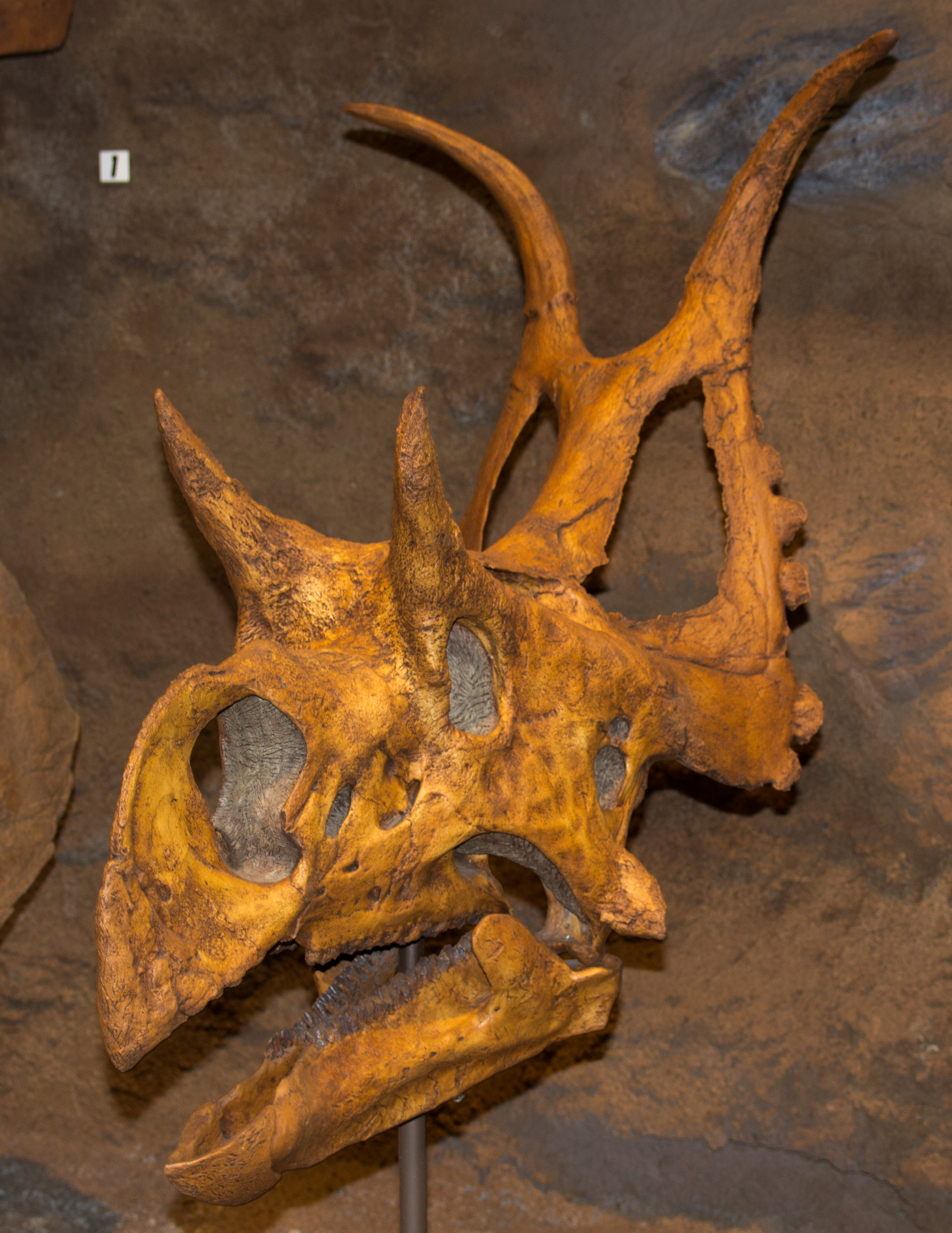 Pittsburgh-2013-05-18-058